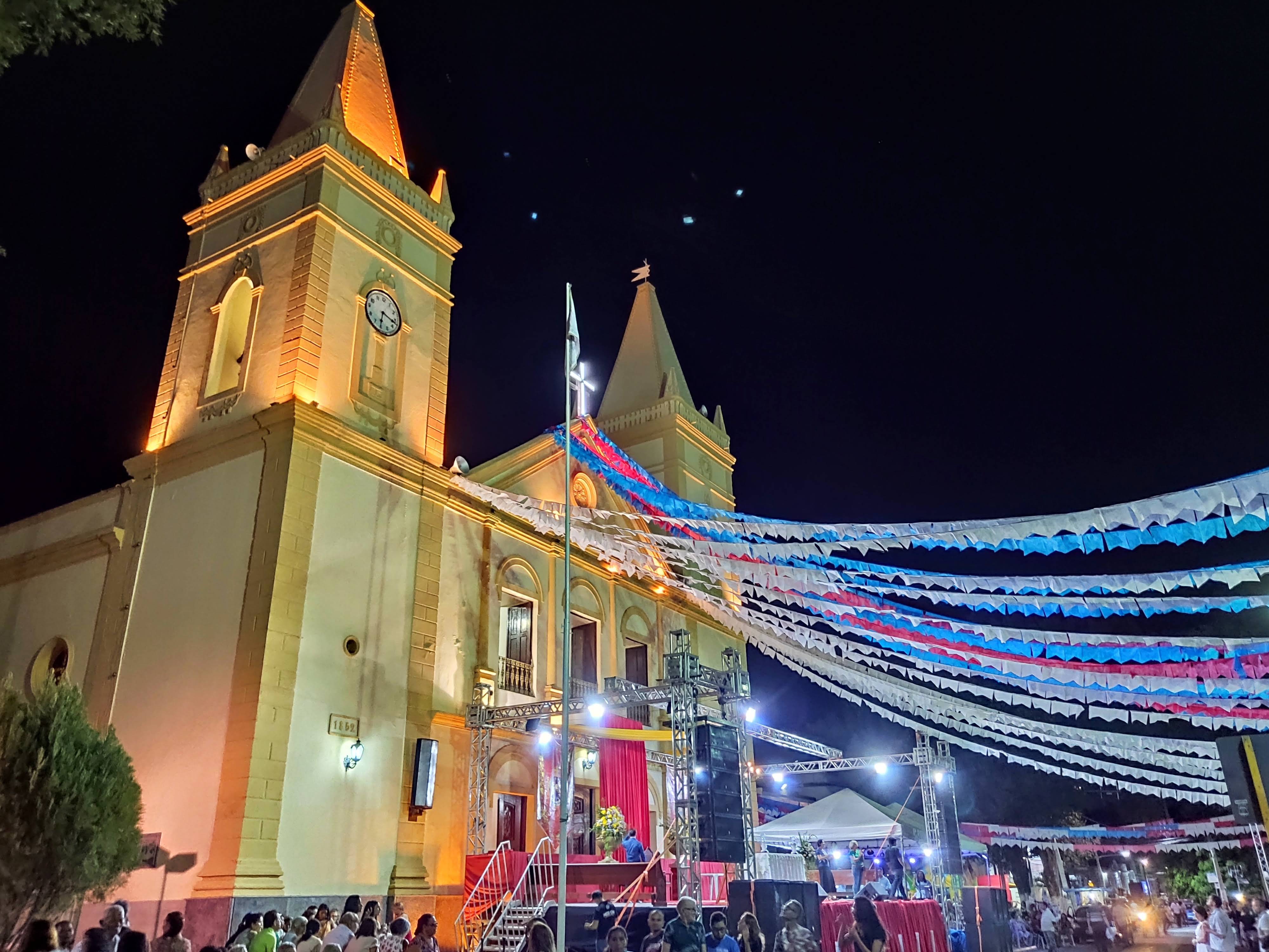 A maior festa desta igreja, dia da padroeira da Cidade de Crato CE, Nossa Senhora da Penha. Cultural property Catedral de Nossa Senhora da Penha da França de Crato, Crato, Ceará, Brazil Q15711671, P727:, SIPA ID: 21708